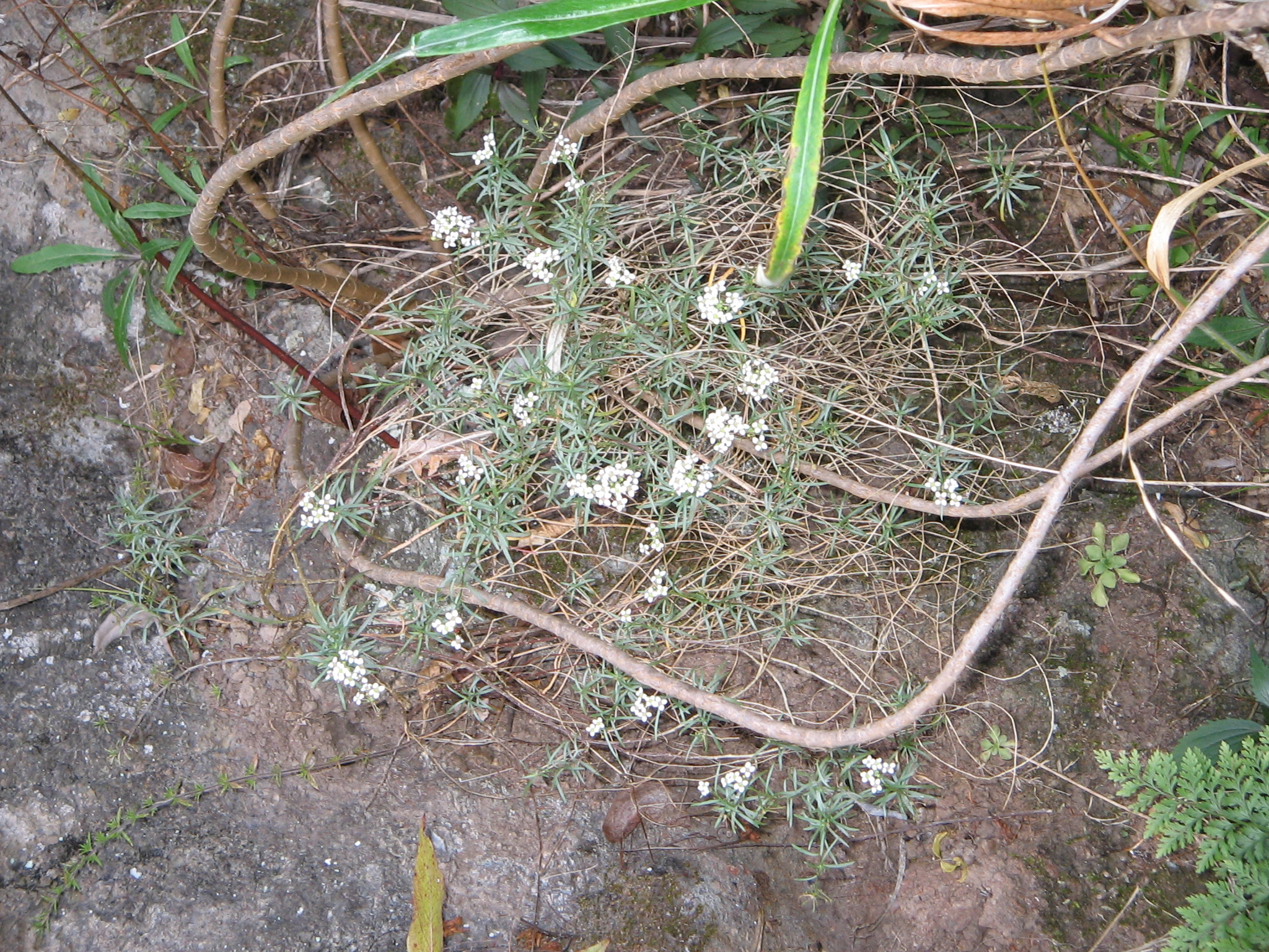 Lobularia canariensis - Photographié à La Palma